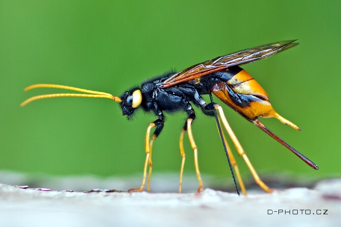 Na obrázku je pilořitka velká, která stojí na kusu dřeva